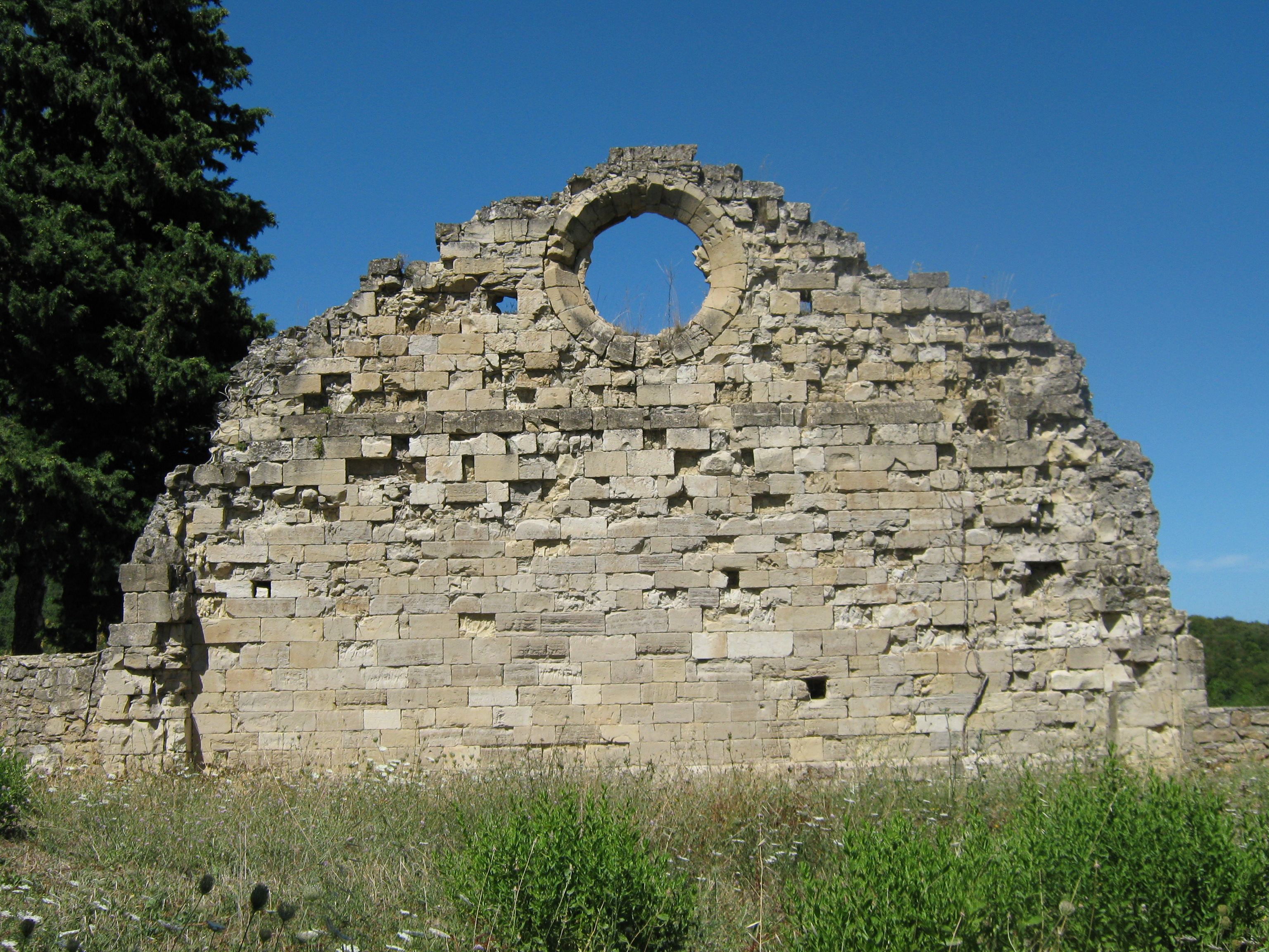 Faciada Sud-èst.